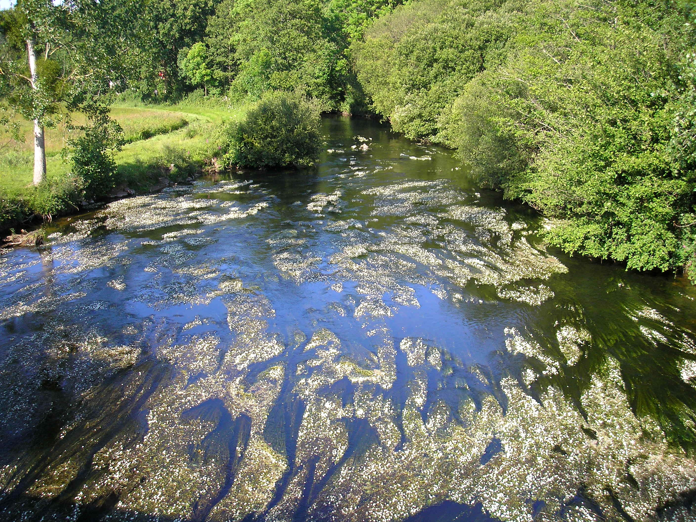 La Sélune entre Ducey, à gauche, et Saint-Laurent-de-Terregatte, à droite (Normandie, France).